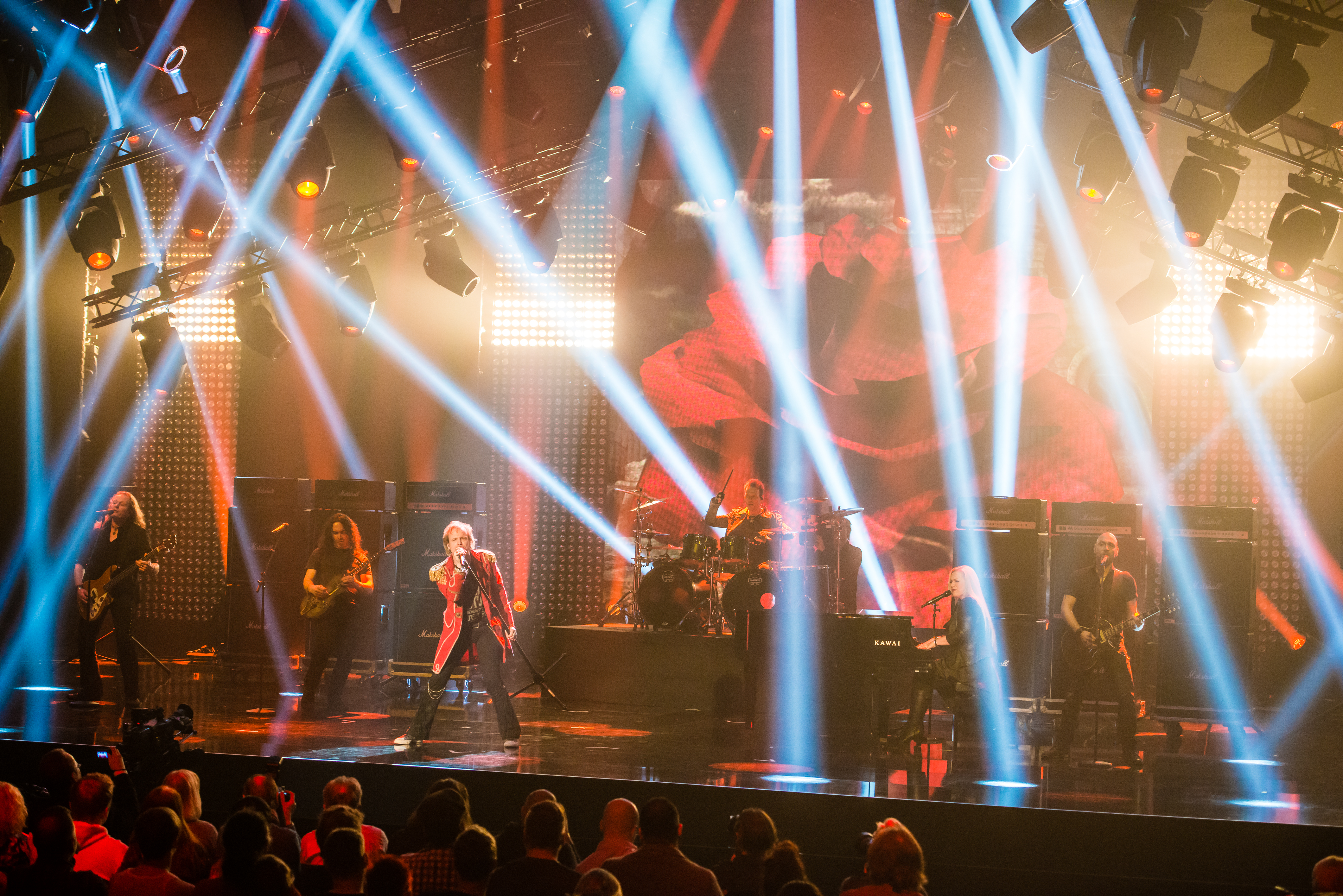 Eurovision Song Contest 2016 - Unser Lied für Stockholm - Avantasia